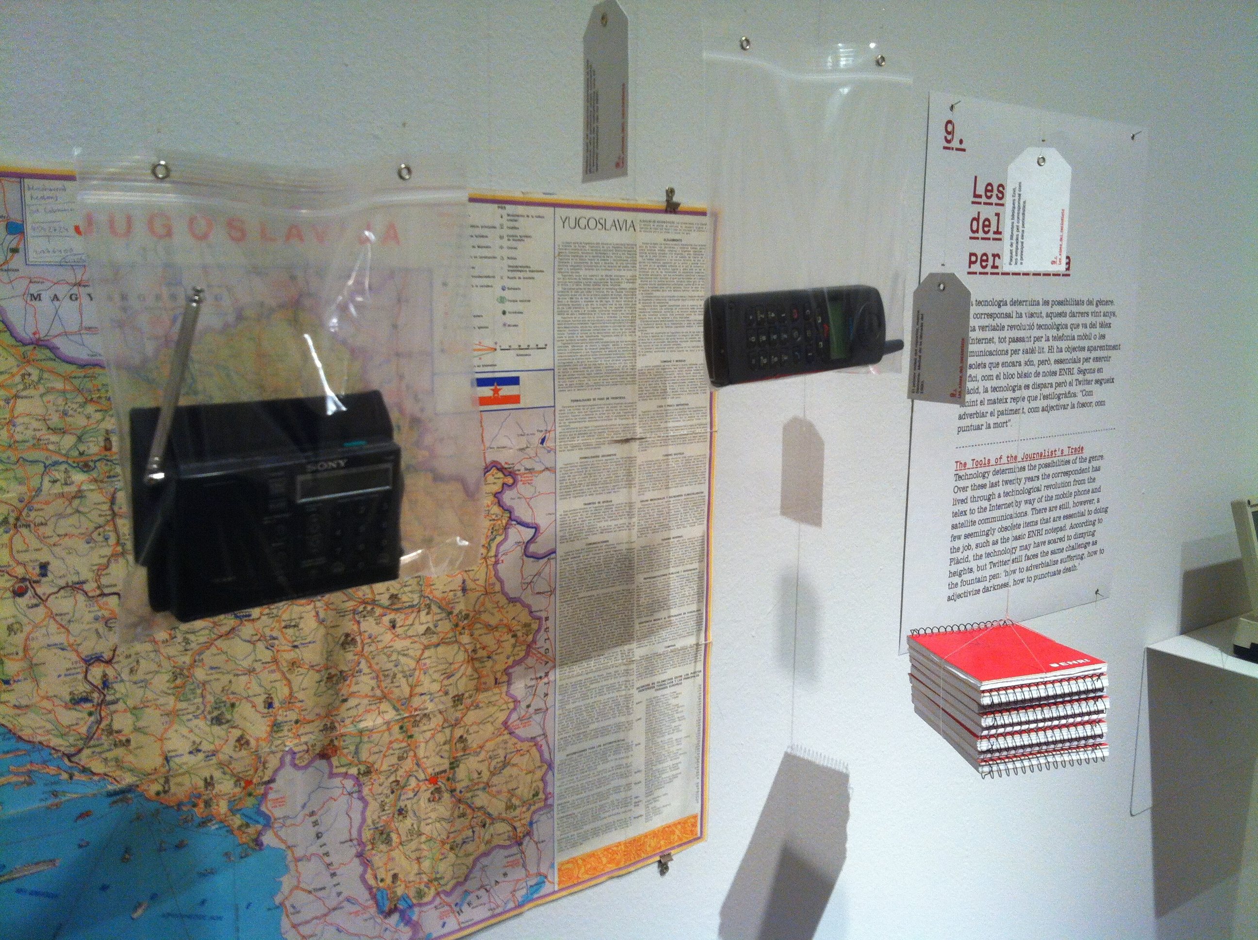 Materials exposats a l'Exposició a l'Arts Santa Monica:L'arxiu del corresponsal de Guera. Col·lecció Plàcid Garcia-Planas